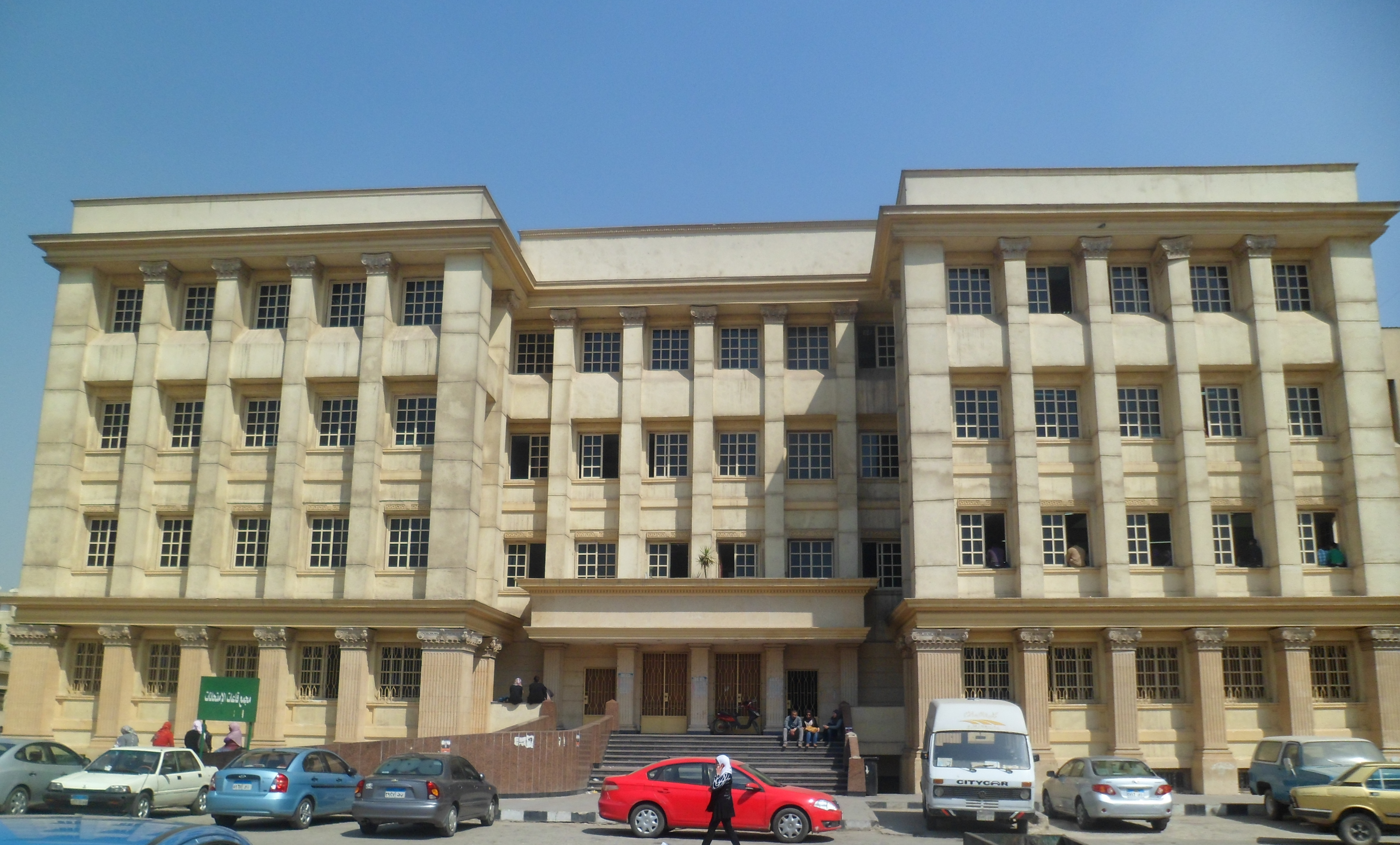 مجمع قاعات الامتحانات، جامعة القاهرة